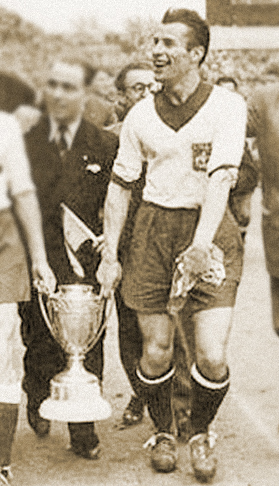 Jean-Marie Prévost porte la coupe de France lors du tour d'honneur en 1946 à Colombes